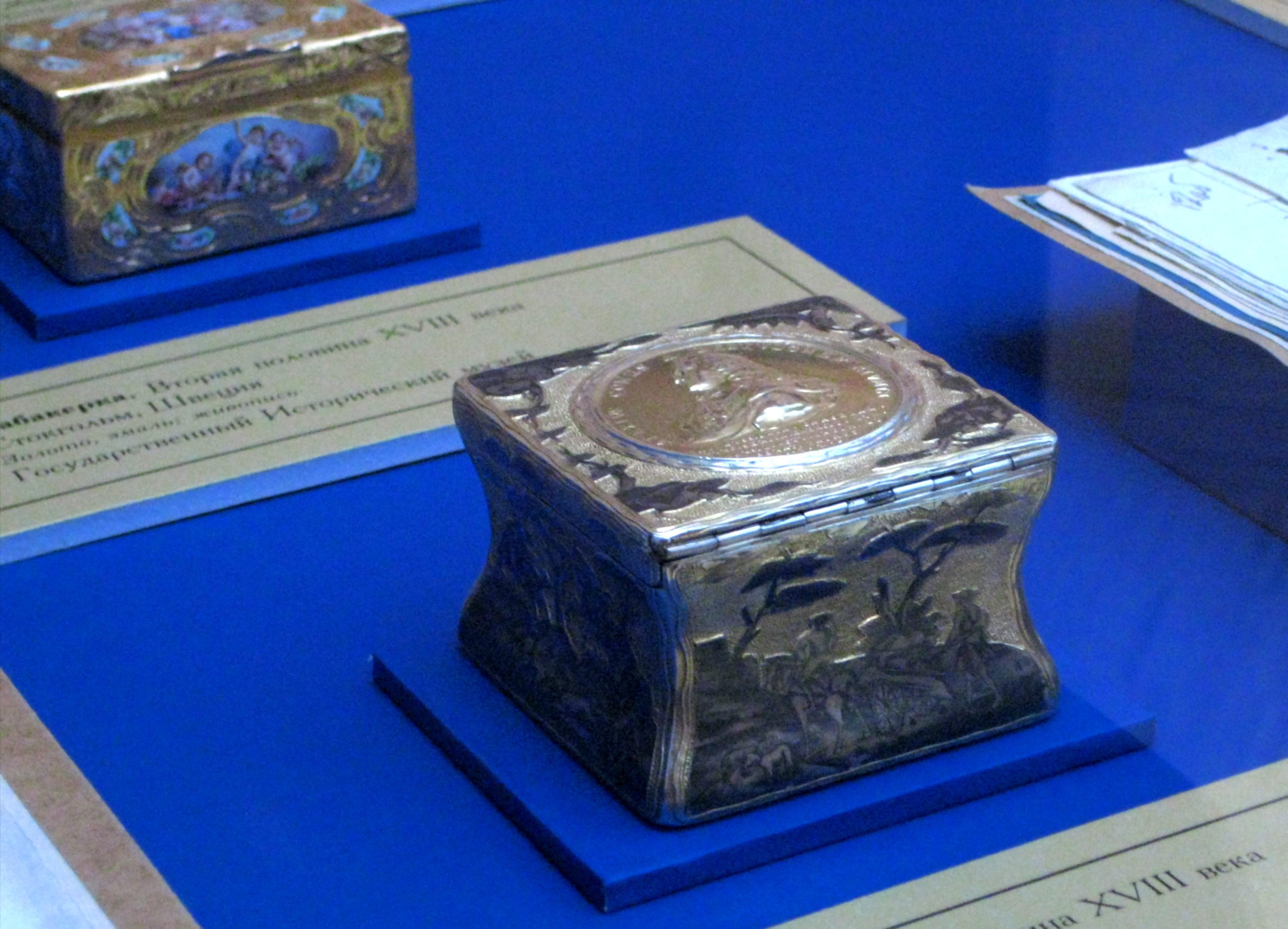 Табакерка. 2-я пол. 18 века. Великий Устюг. Серебро. ГИМ. В табакерку вмонтированы оттиски с подлинных штемпелей медалей, которые граф А.П. Бестужев-Рюмин заказывал сам. На крышке - на его погрудный портрет (1762), на дне - его же (1757)